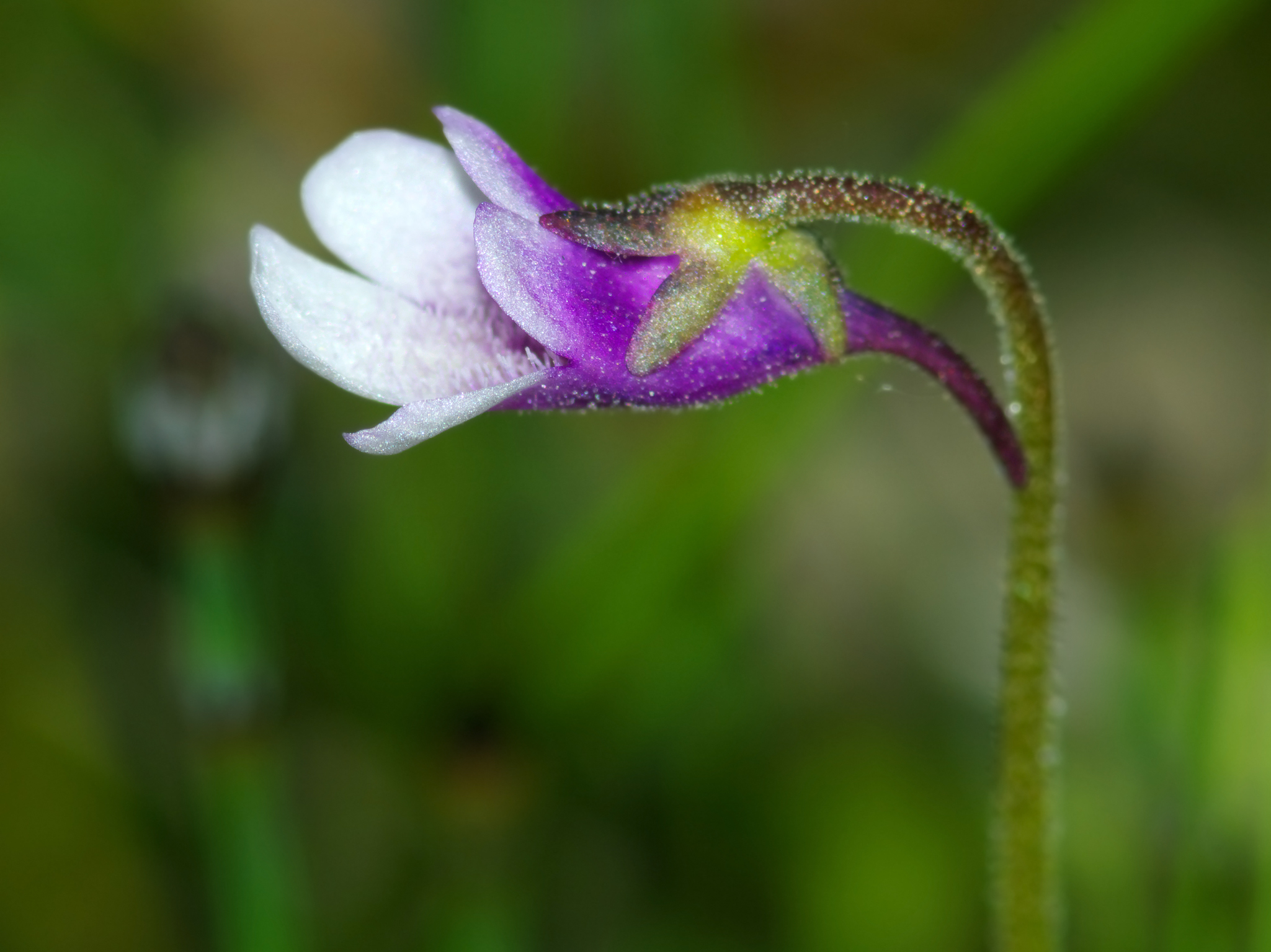 Tłustosz pospolity dwubarwny - Pinguicula vulgaris subsp. bicolor na terenie wysięków Kuźnicy Warężyńskiej w Dąbrowie Górniczej